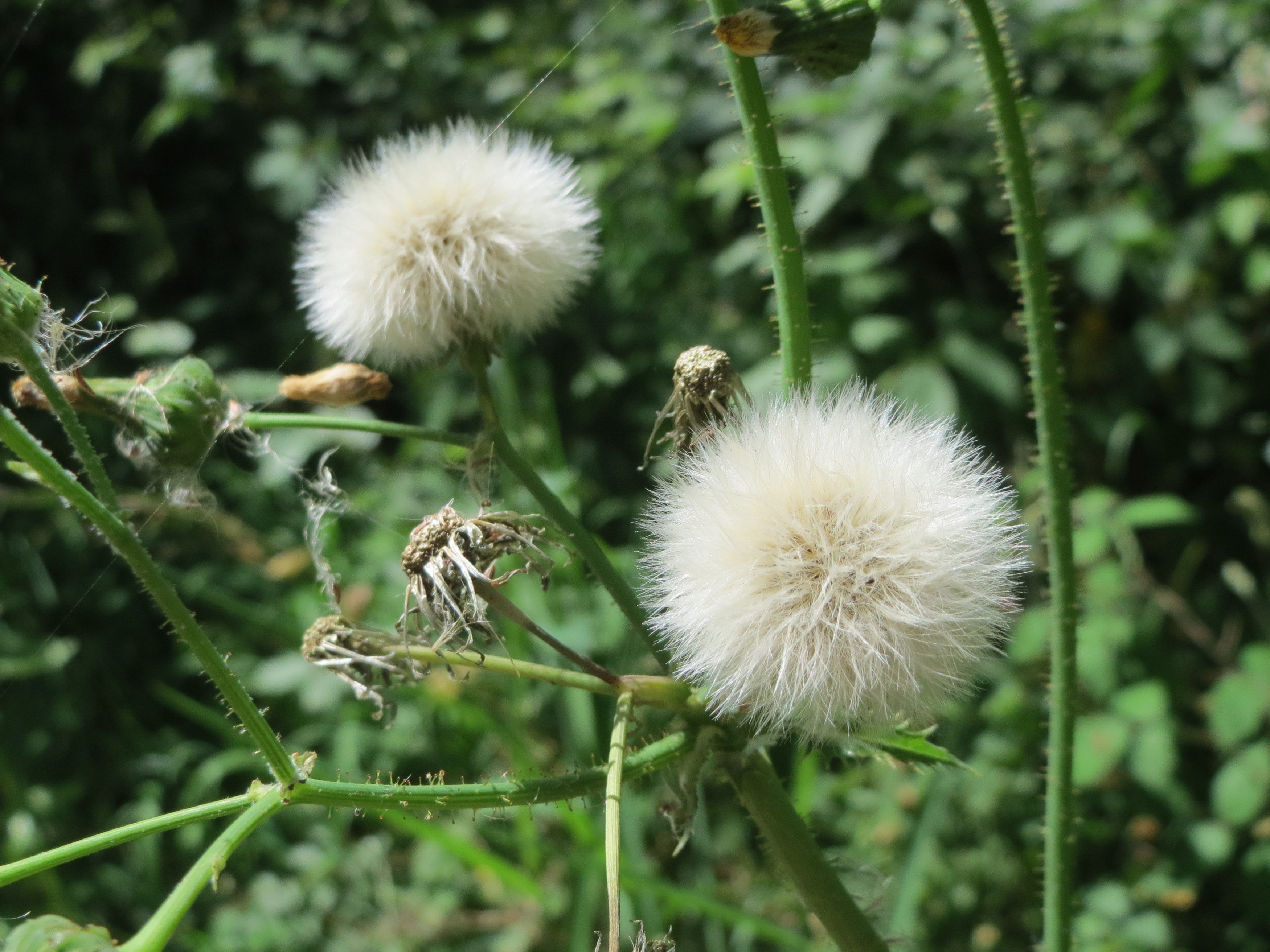 Raue Gänsedistel (Sonchus asper) im Schwetzinger Hardt